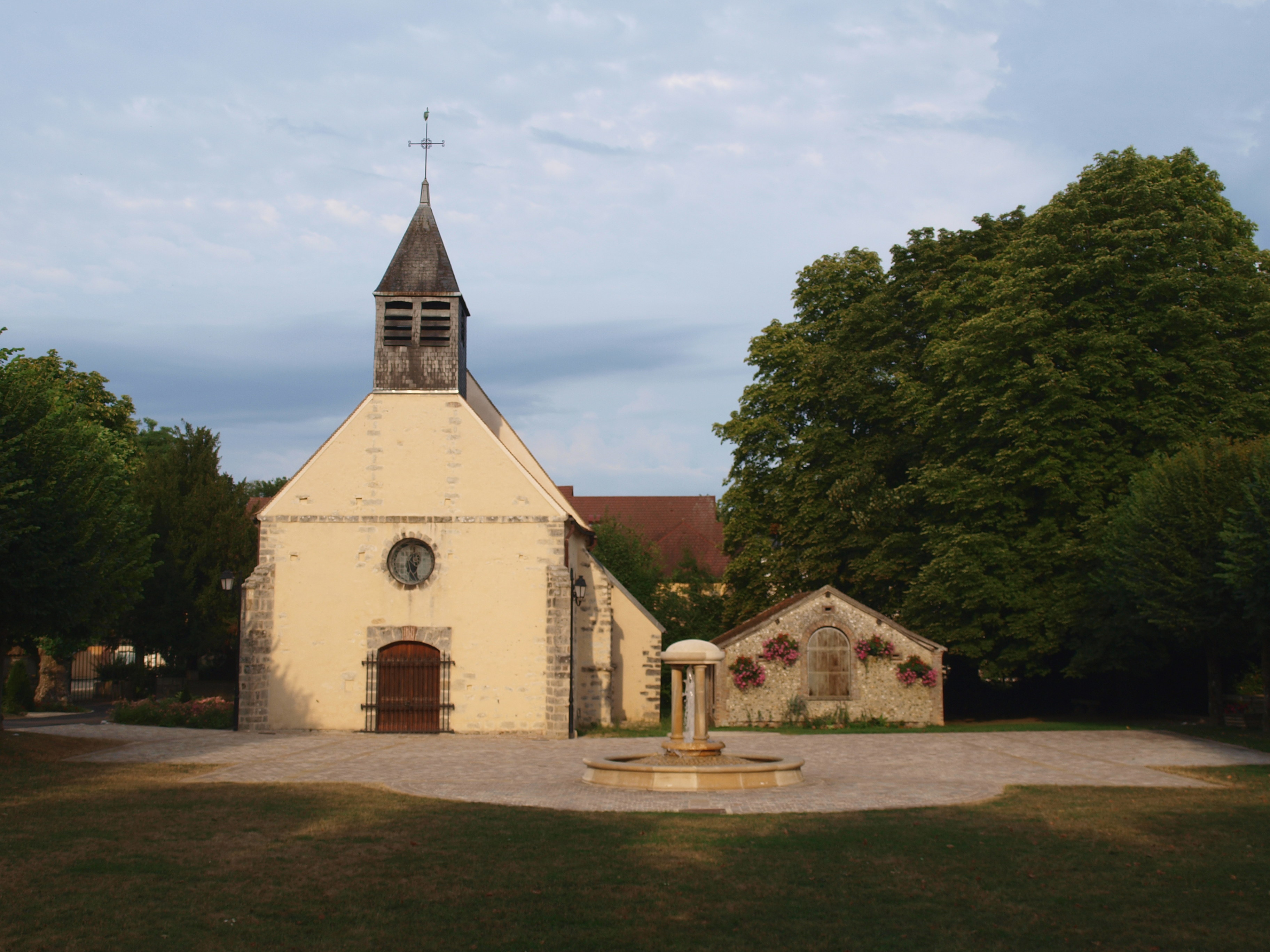 Paron (Yonne, France) ; l'église